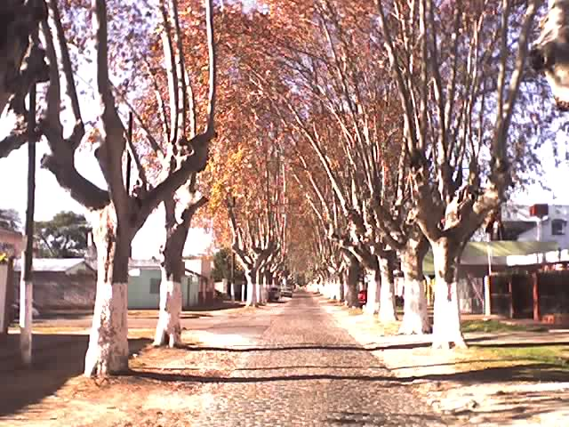 Calle San José, Merlo, Provincia de Buenos Aires.